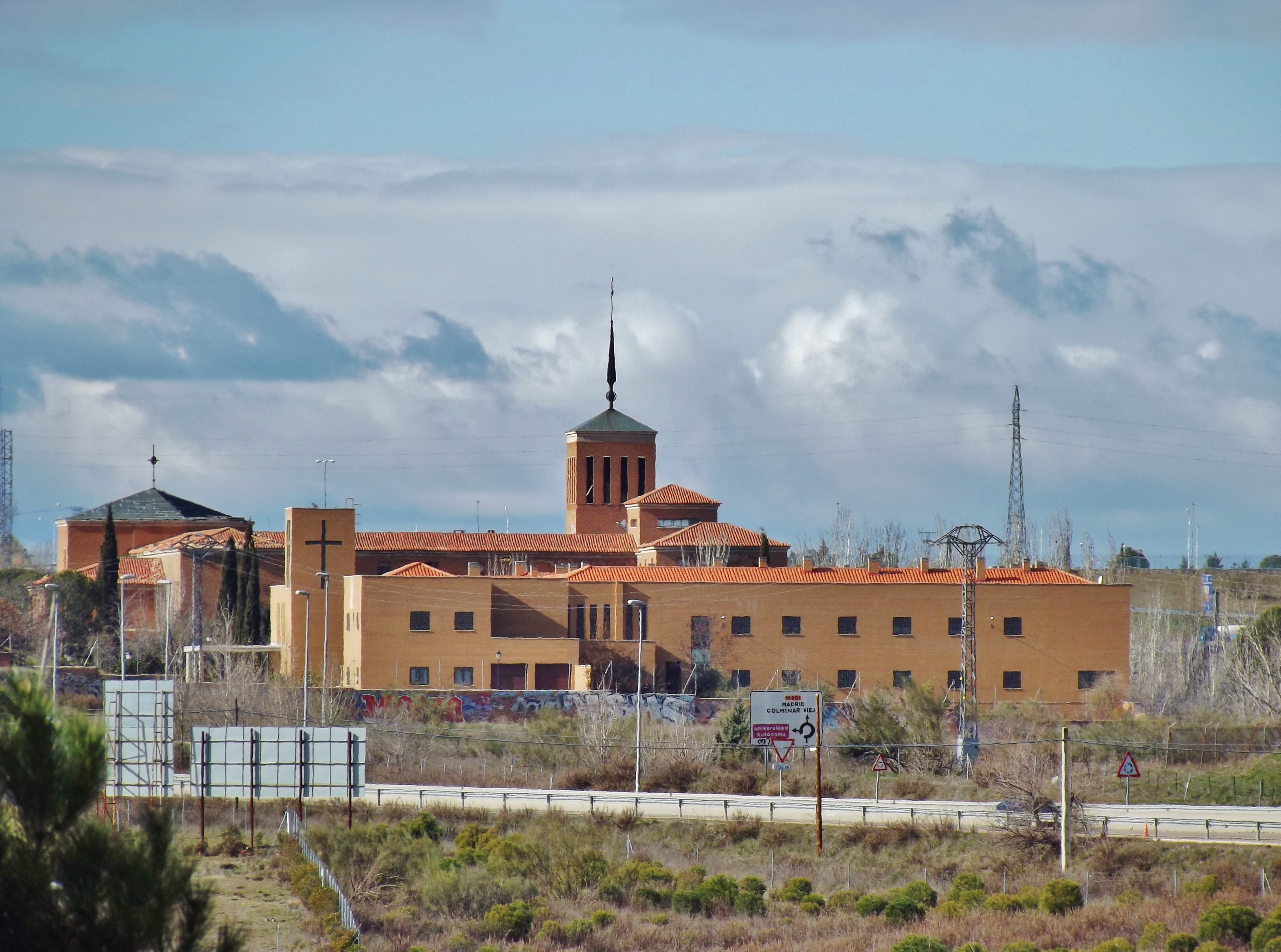 Edificio del Convento de la Concepción Jerónima, en El Goloso, Madrid.